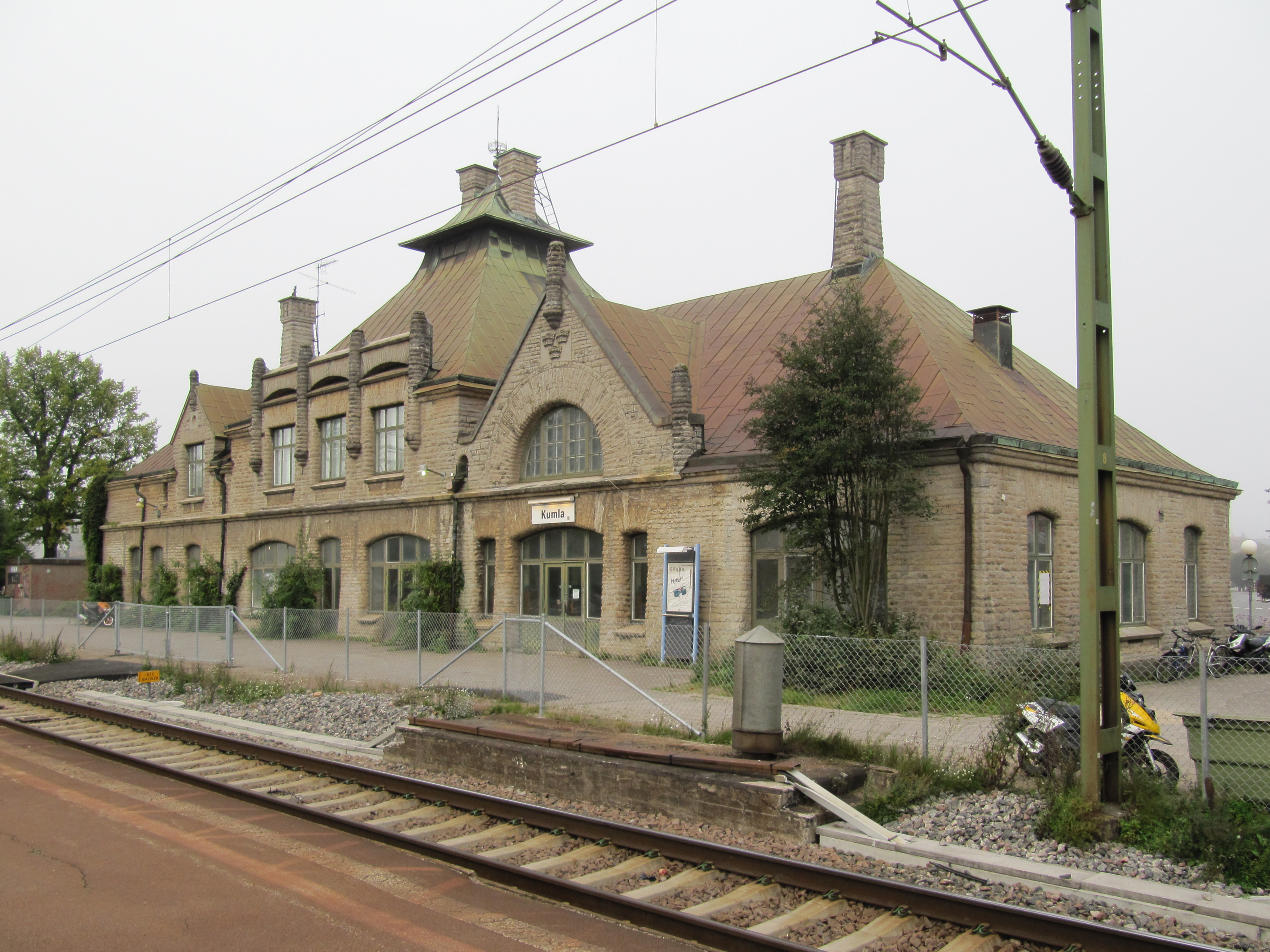 Kumla järnvägsstation